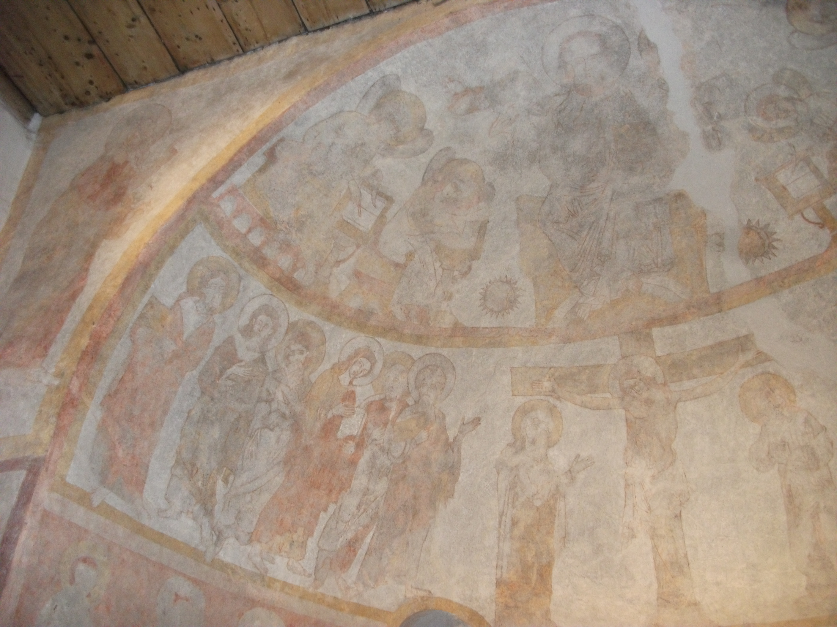 Romanische Fresken im Chorraum